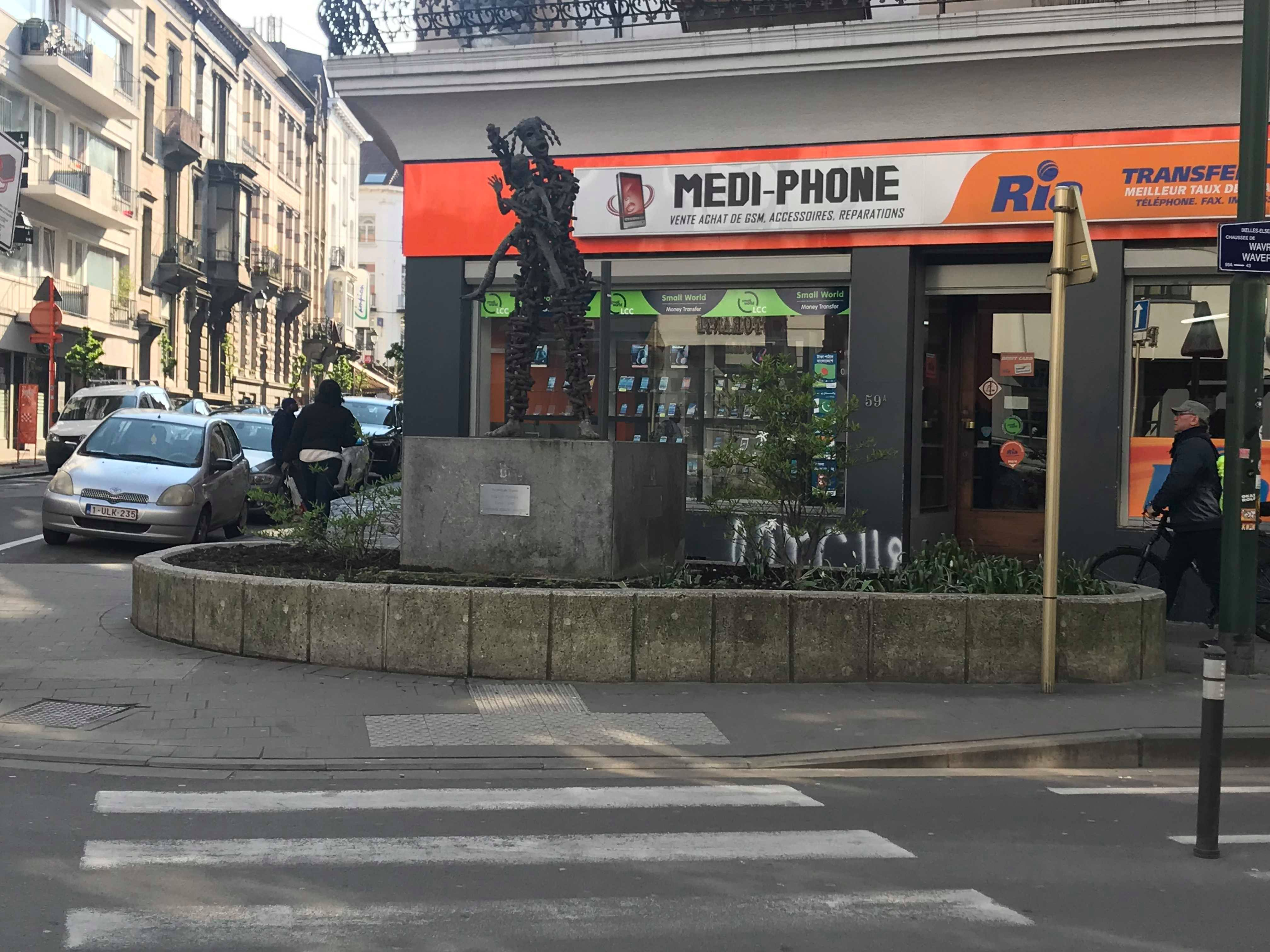 Standbeeld gemaakt uit kogelhulzen